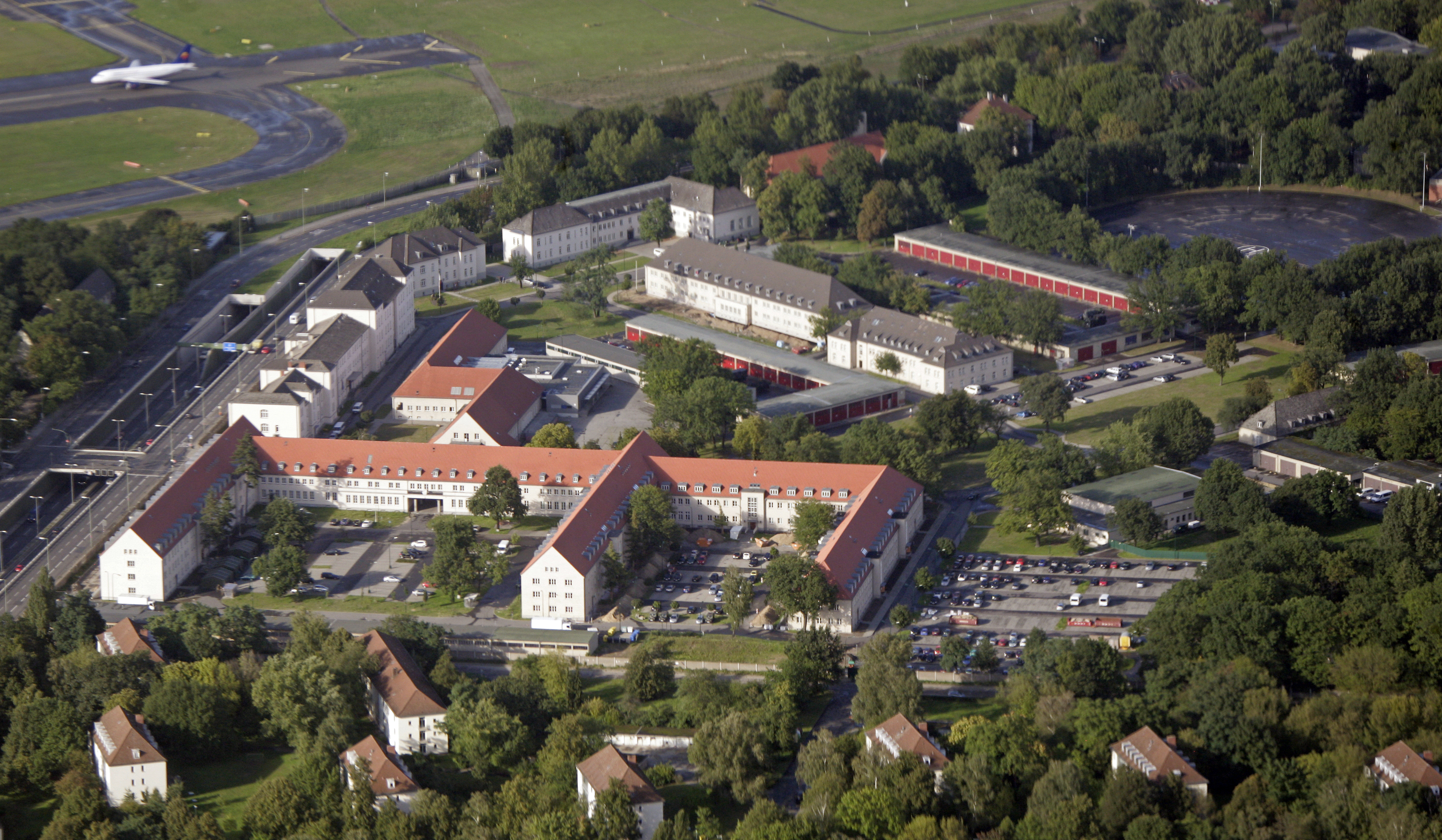 Die Julius-Leber-Kaserne in Berlin aus der Vogelperspektive.